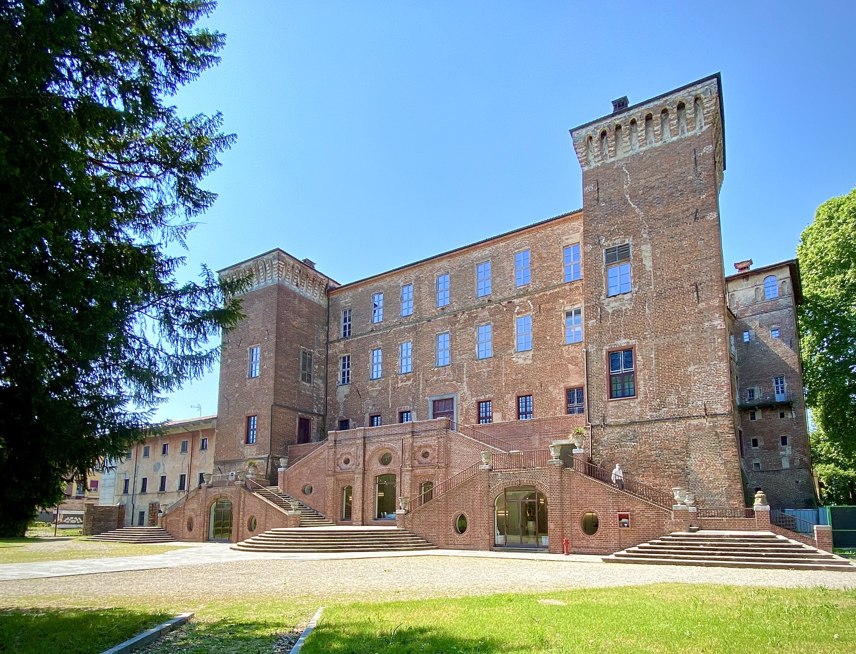 Castello della Rovere retro